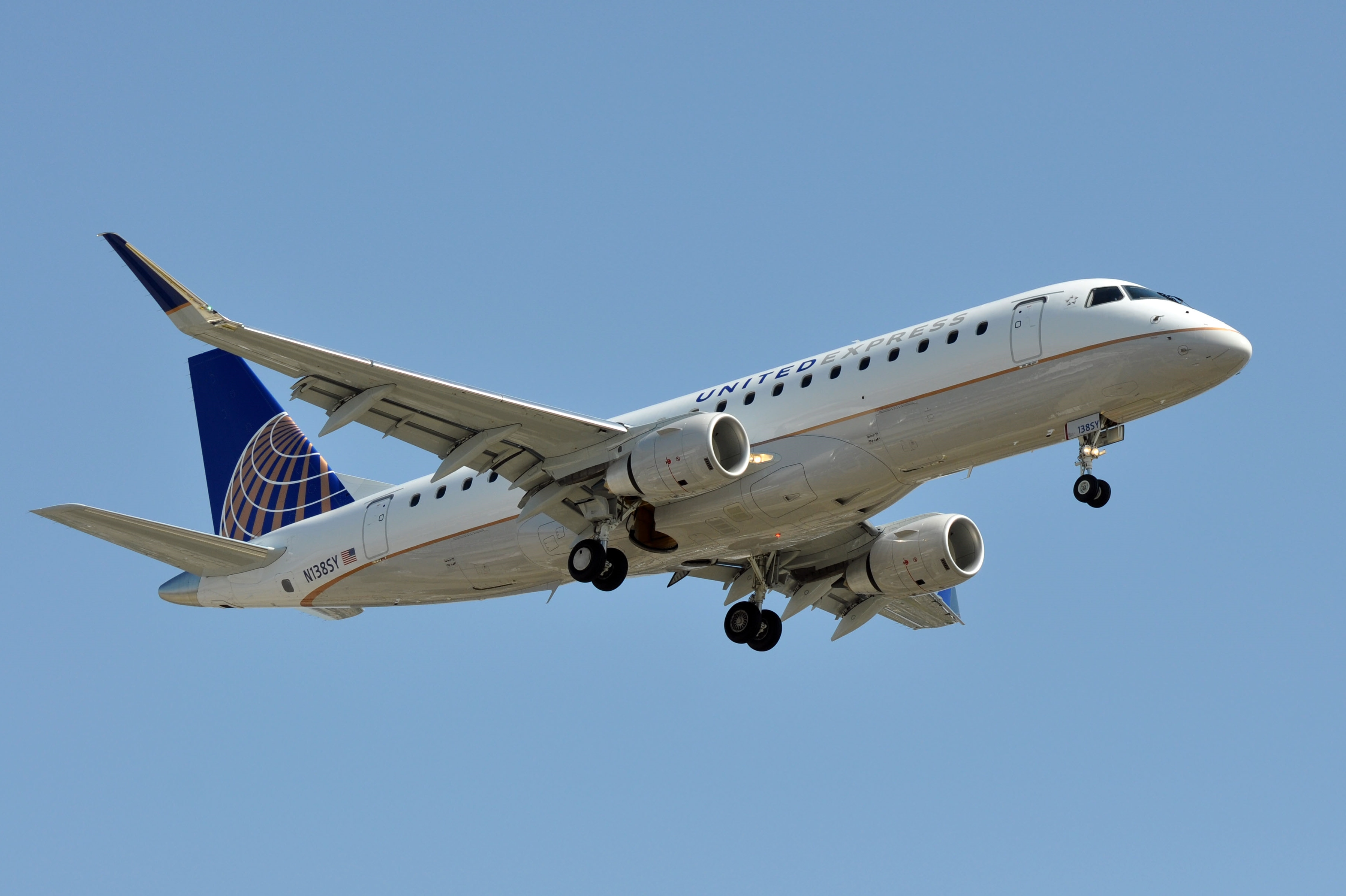 MSN 466 EMB 175LR SKYWEST USA / UNITED EXPRESS LAX AIRPORT